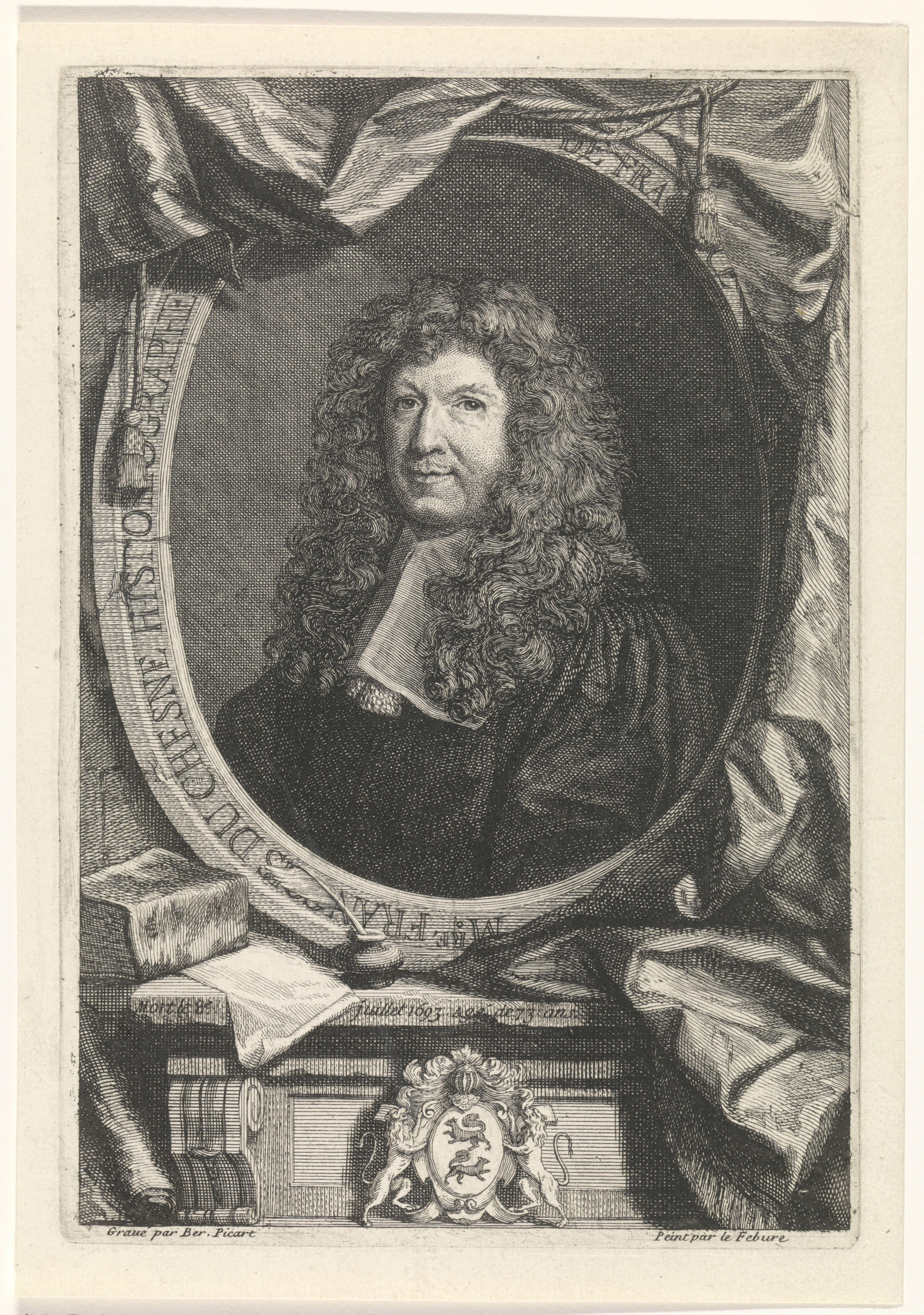 IdentificatieTitel(s): Portret van François Du ChesneObjecttype: prent Objectnummer: RP-P-OB-51.022Opschriften / Merken: verzamelaarsmerk, verso, gestempeld: Lugt 2228Omschrijving: Portret van de schrijver François Du Chesne, op 73-jarige leeftijd. Op de piëdestal zijn wapenschild.VervaardigingVervaardiger: prentmaker: Bernard Picart (vermeld op object)naar schilderij van: Claude Lefèbvre (vermeld op object)Plaats vervaardiging: ParijsDatering: 1693Fysieke kenmerken: ets en gravureMateriaal: papier Techniek: etsen / graveren (drukprocedé)Afmetingen: plaatrand: h 216 mm × b 147 mmOnderwerpWat: armorial bearing, heraldrybookwriting toolsWie: François Du ChesneVerwerving en rechtenVerwerving: onbekendCopyright: Publiek domein